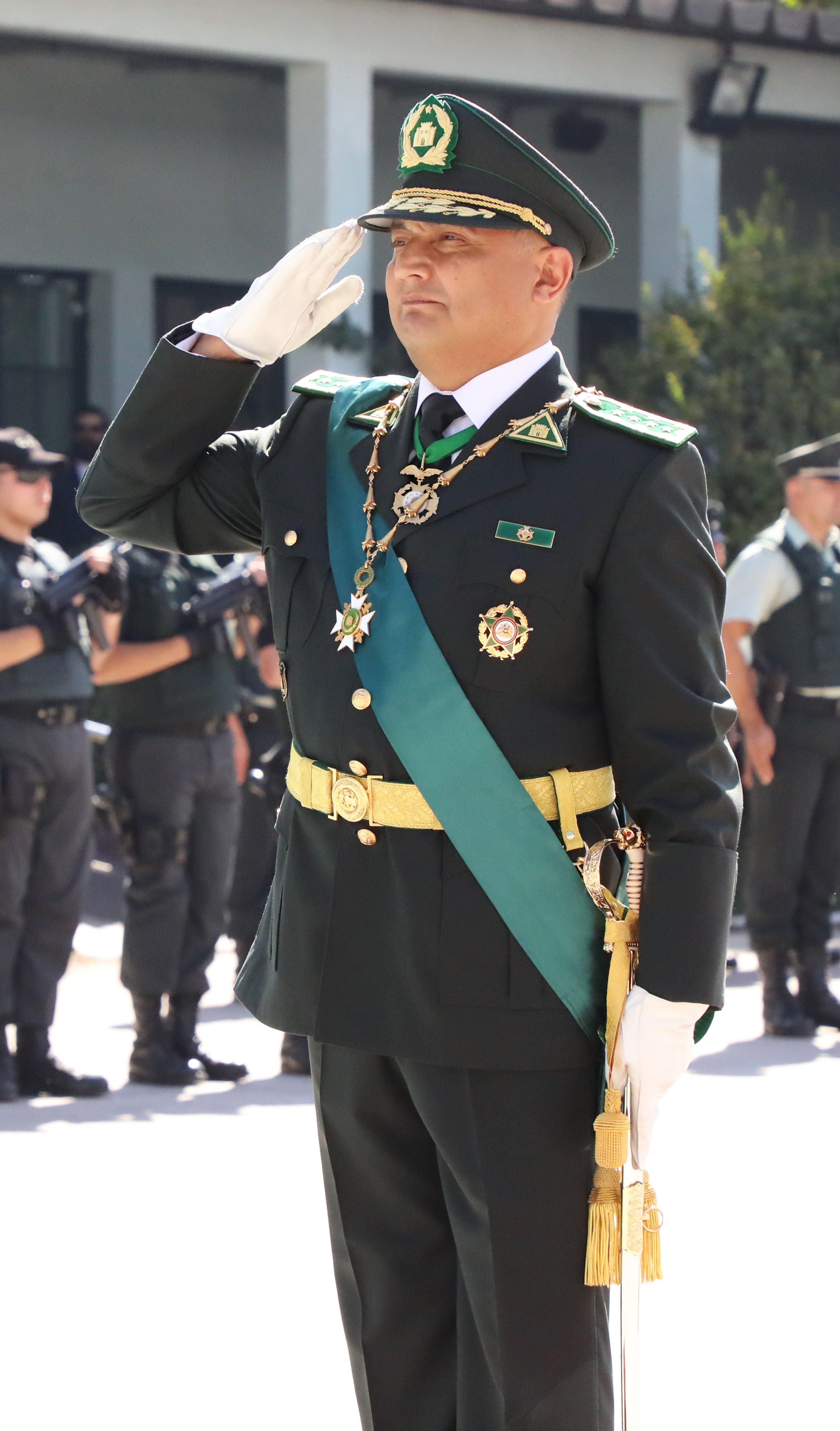 Director Nacional de Gendarmería Christian Alveal Gutiérrez en Ceremonia de Investidura